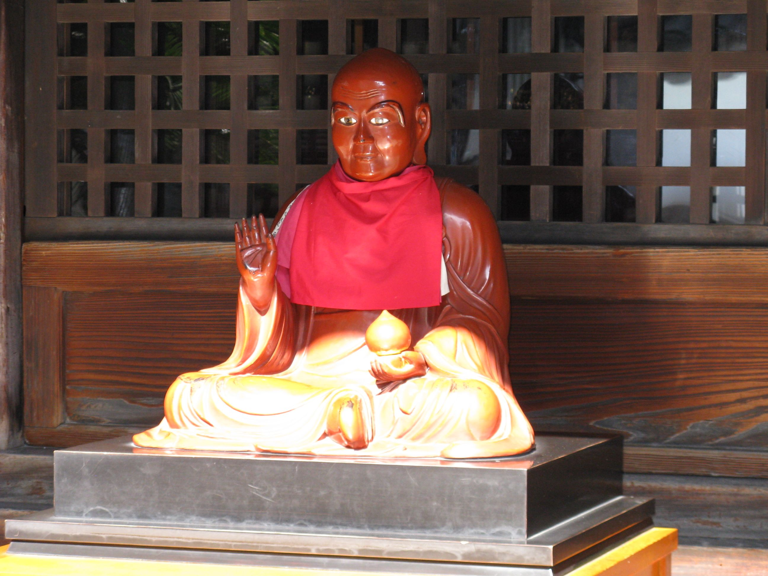 三津寺 おびんずる像